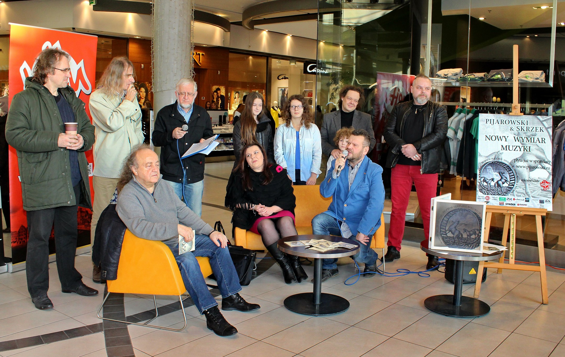 Promocja płyty "Requiem dla chwil minionych" od lewej stoją:Wojciech Lachowski, Wojciech Kowalczyk, Zdzisław Pająk (dziennikarz), Aleksandra Kortas, Dominika Dyngosz, Wojciech Dyngosz, Dariusz Sadecki, od lewej siedzą: Józef Skrzek, Monika Dyngosz, Jarosław Pijarowski.